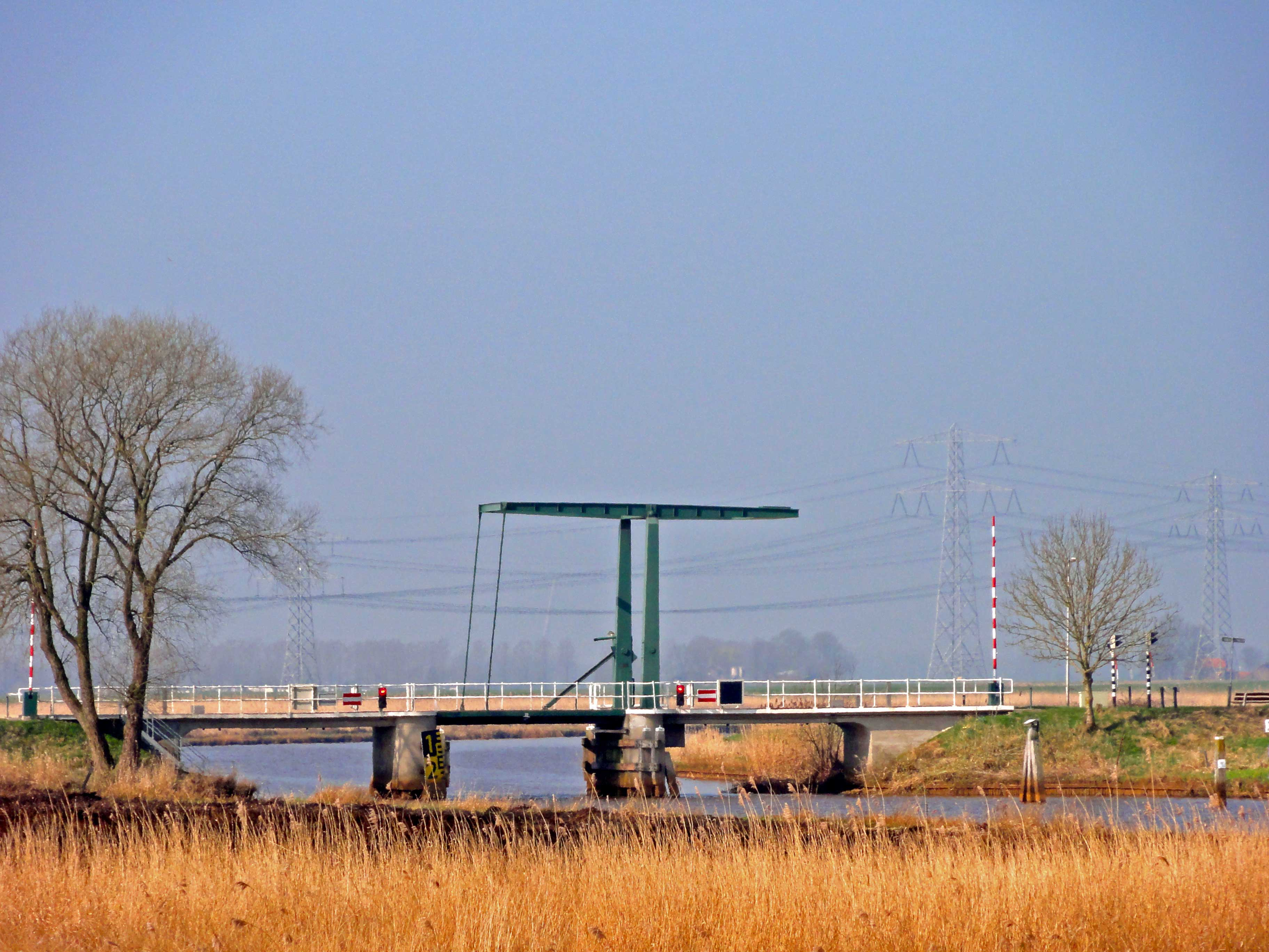 Brug over de Goot tussen de polders Mastenbroek en de Mandjeswaard bij Lutterzijl